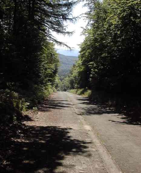 Oberer Teil der Steilstrecke der Nürburgring-Nordschleife